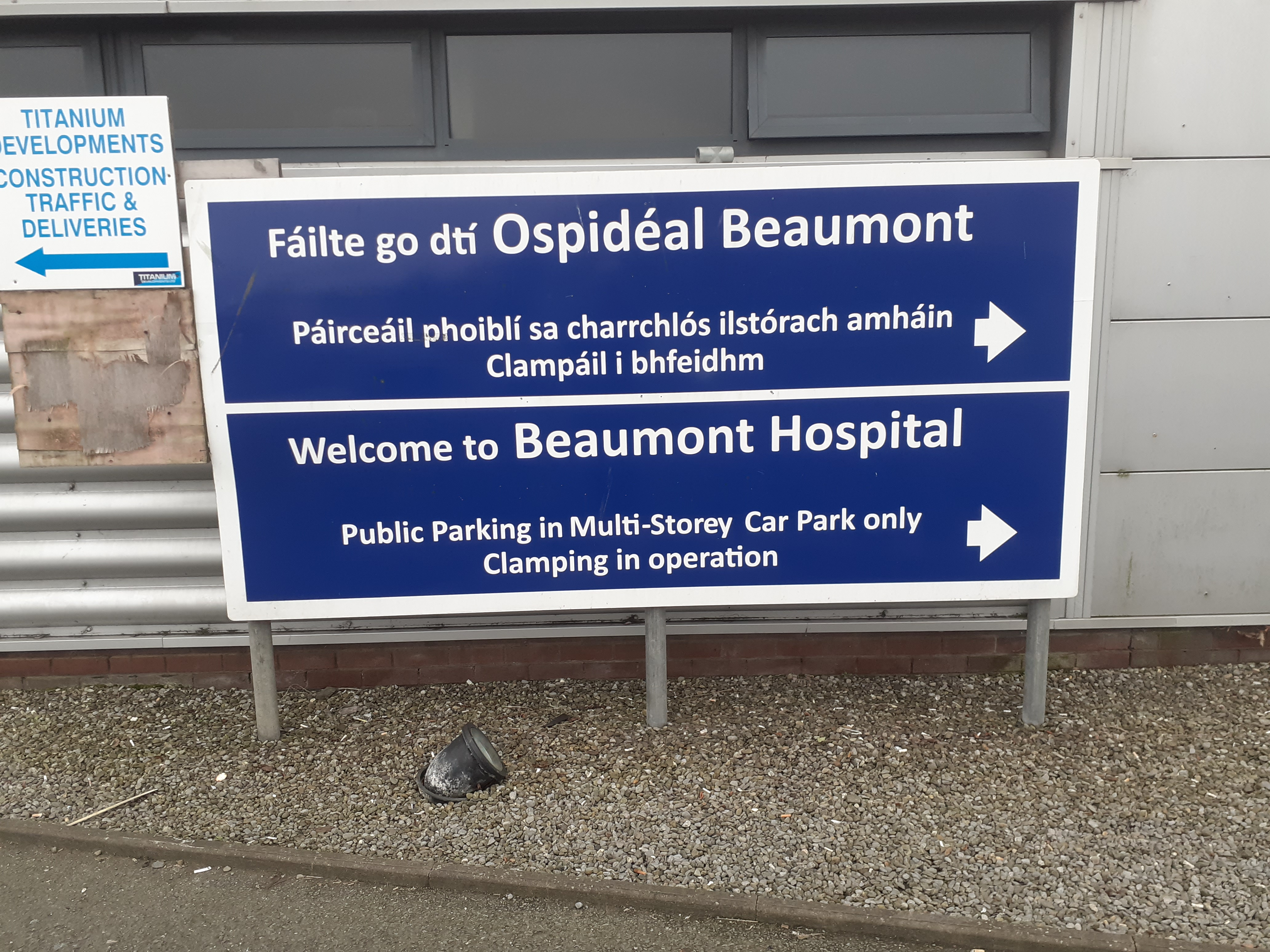 Comhartha fáilithe go dtí Ospidéal Beaumont.